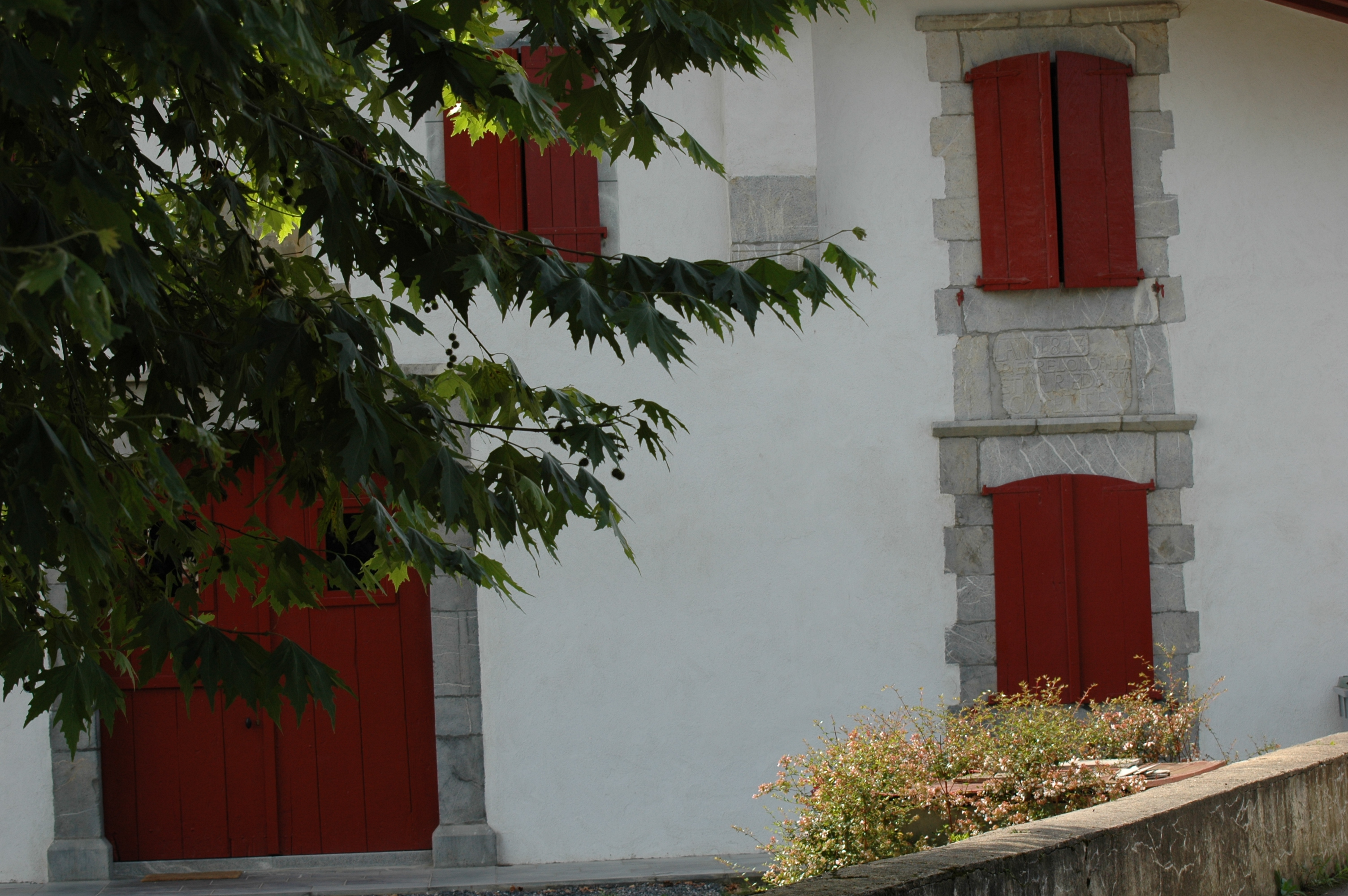 Mendionde, quatier Gréciette, fenêtre bouteille